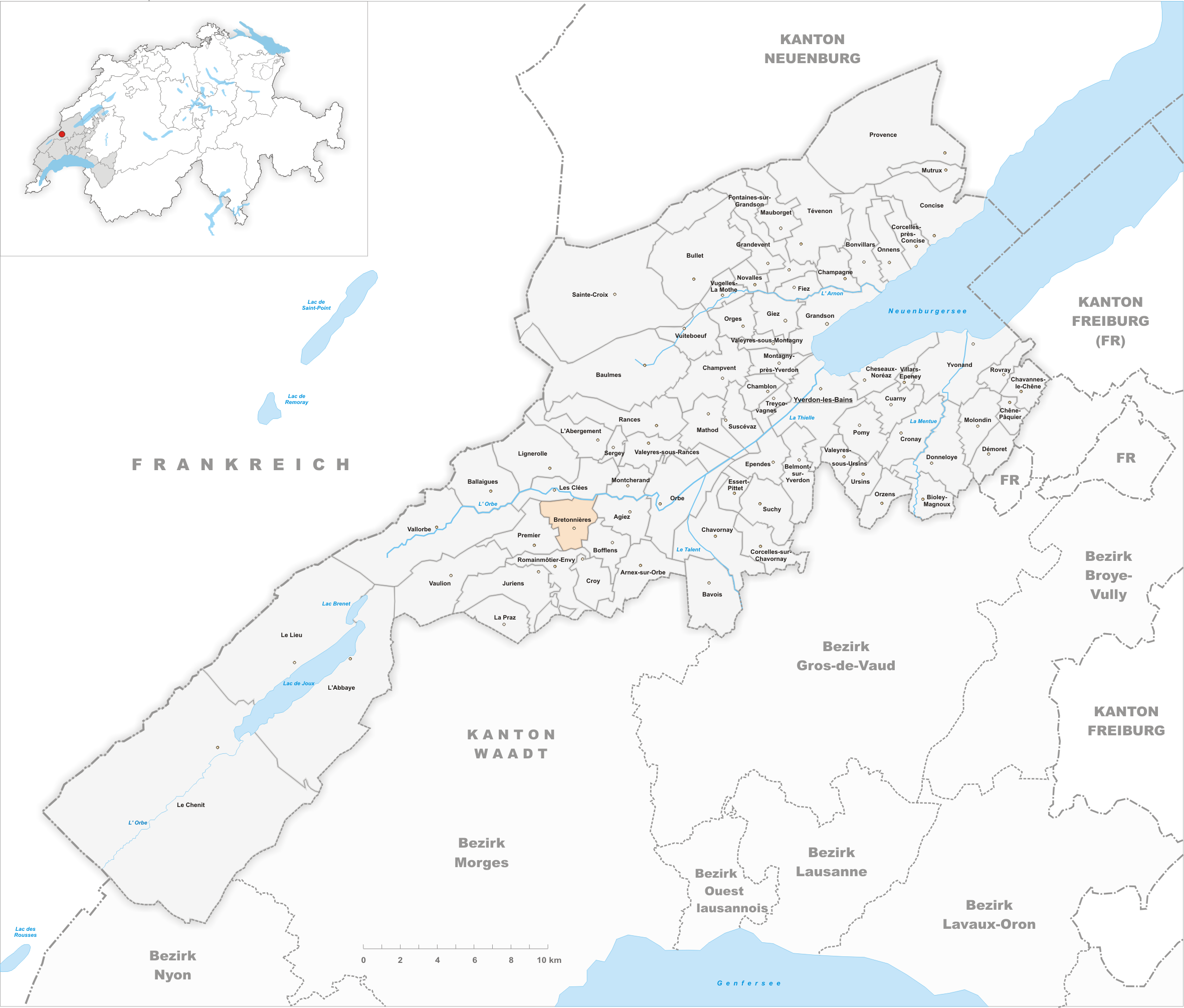 Municipality Bretonnières